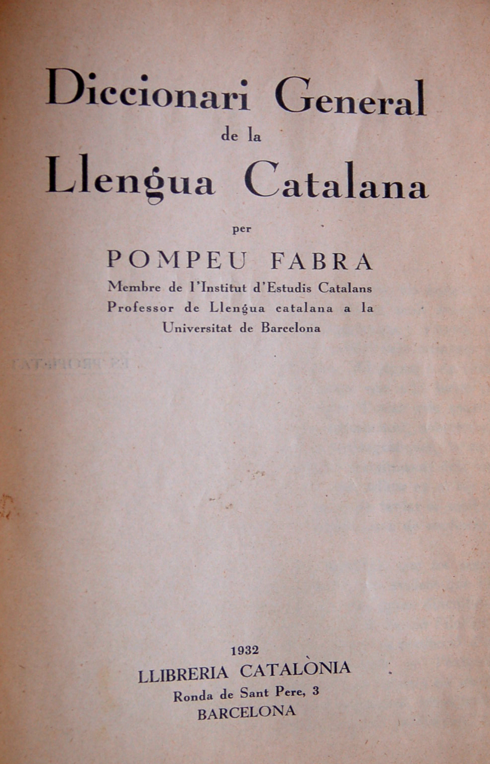 Portada del Diccionari General de la Llengua Catalana (1932)